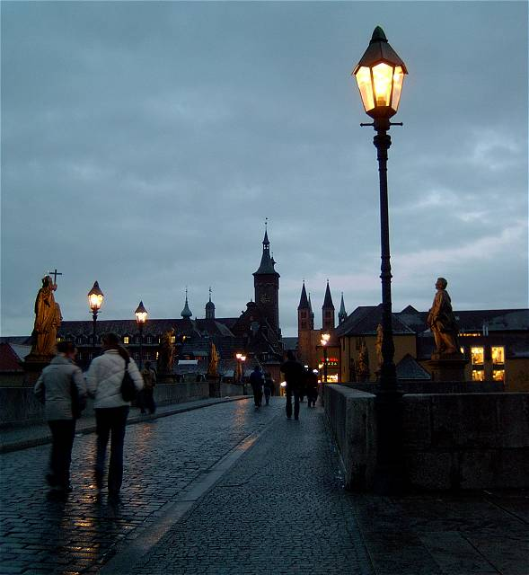 Alte Mainbrücke in Richtung Domstraße